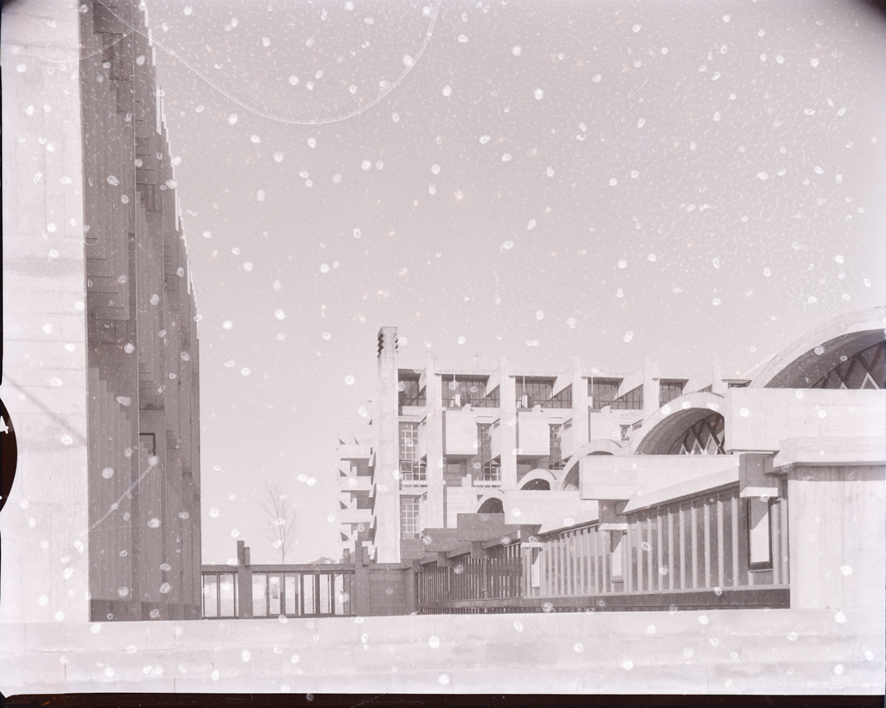 Servizio fotografico : Milano, 1959 / Paolo Monti. - Buste: 5, Fototipi: 7 : Negativo b/n, gelatina bromuro d'argento/ pellicola ; 10x12. - ((Serie costituita da 7 buste di negativi identificati con una doppia numerazione (da 186 a 190): 3337, 3338, 3339, 3340, 3341, 3342, 3343, e tenute insieme da una graffetta. - Sulla busta identificata con la numerazione 3337/38 iscrizione didascalica manoscritta a matita. - I negativi presentano segni di degrado (gelatina raggrinzita, bolle e alterazione tonale). - Sul coperchio della scatola e sulla rubrica citata nelle fonti (in corrispondenza della serie) iscrizione didascalica manoscritta: "Arch. Viganò". - Fonte: Rubrica di Paolo Monti: Archivio 10x12 (ultimi numerati) - dal G1 al (s.d.), presso Archivio Paolo Monti